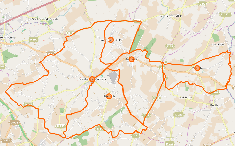 Carte de Saint-Jean-d'Elle , commune nouvelle